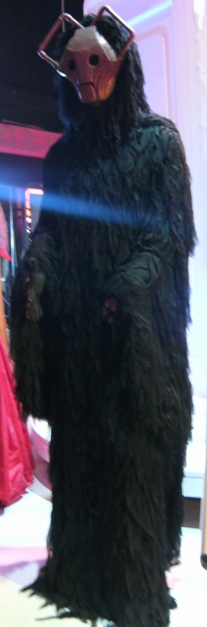 Rollei Doctor Who Experience